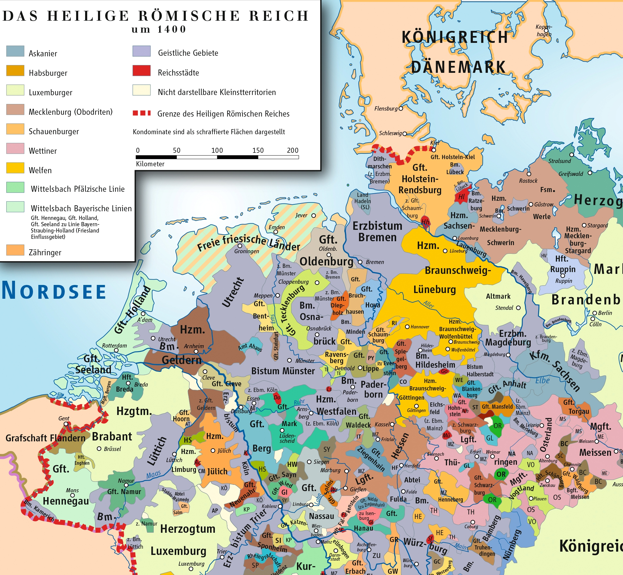 Карта Священной Римской империи в 1400 г. (северная часть)